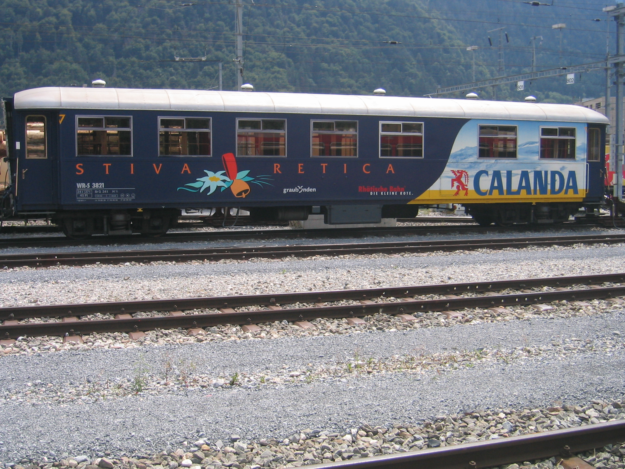 RhB Spezialwagen in Chur